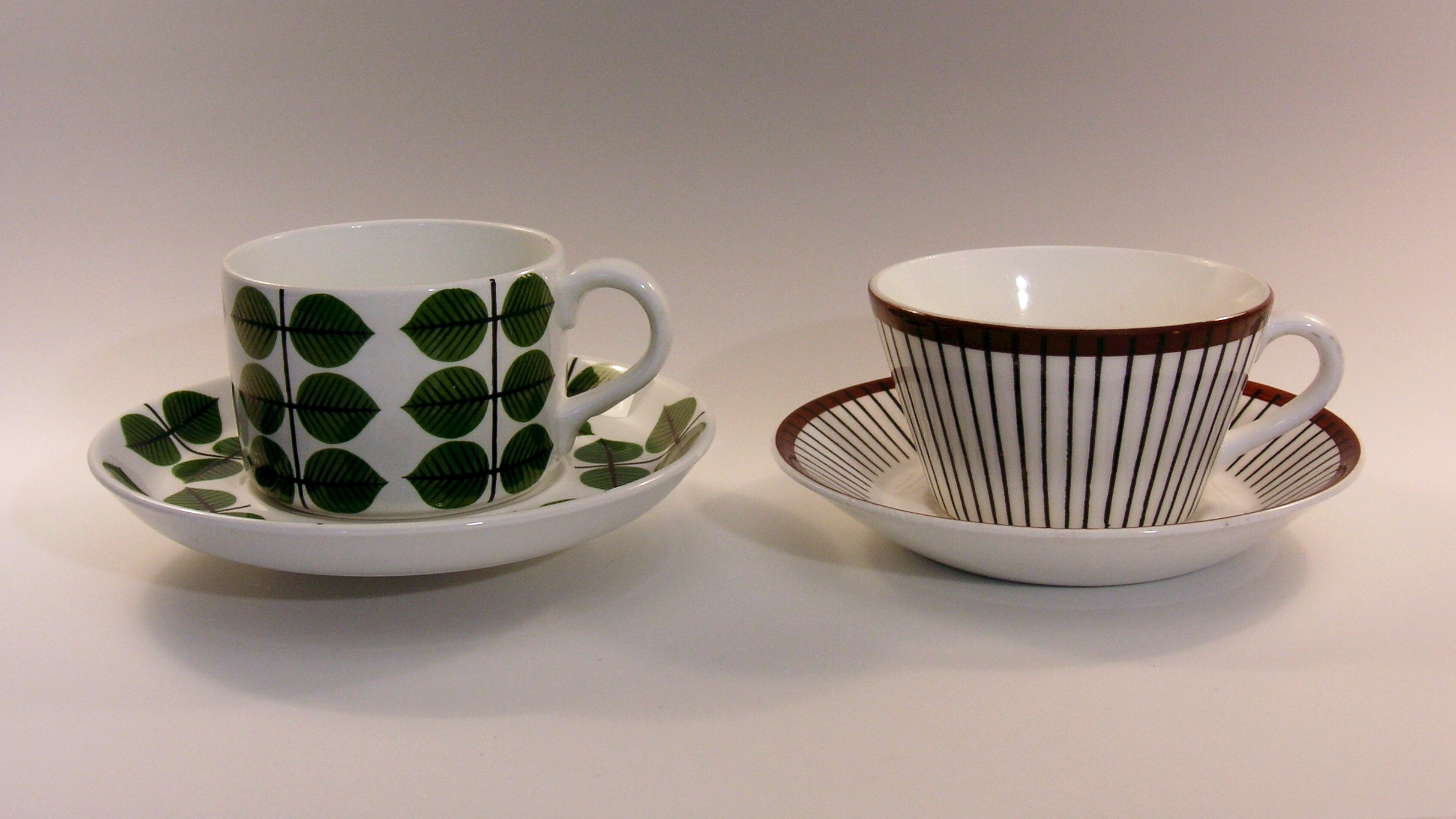 Koppar i benporslin "Berså" (vänster) och "Spisa Ribb" (höger)